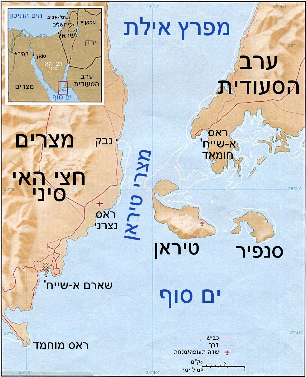 Strait tiran